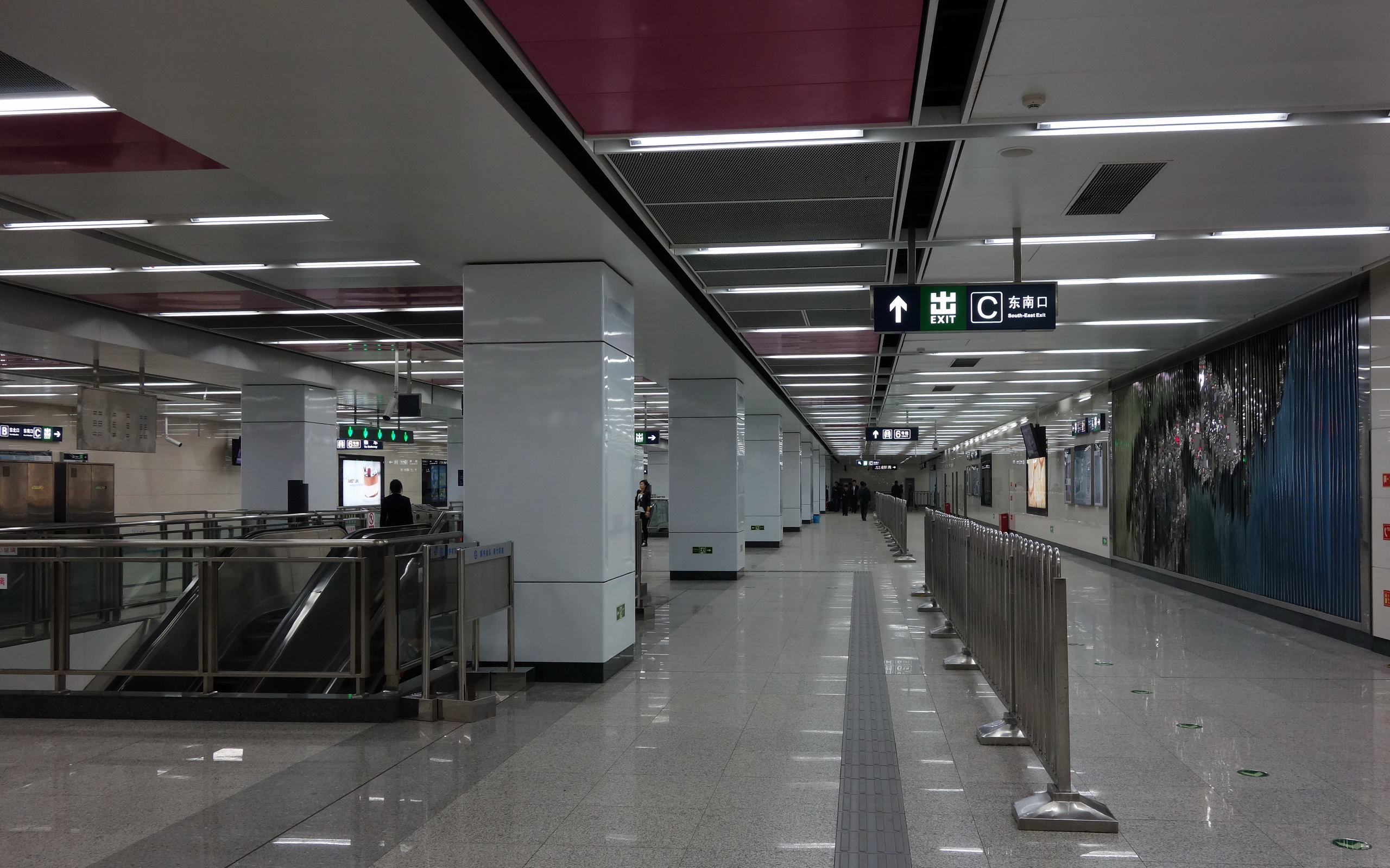 白石桥南站属于9号线部分站厅